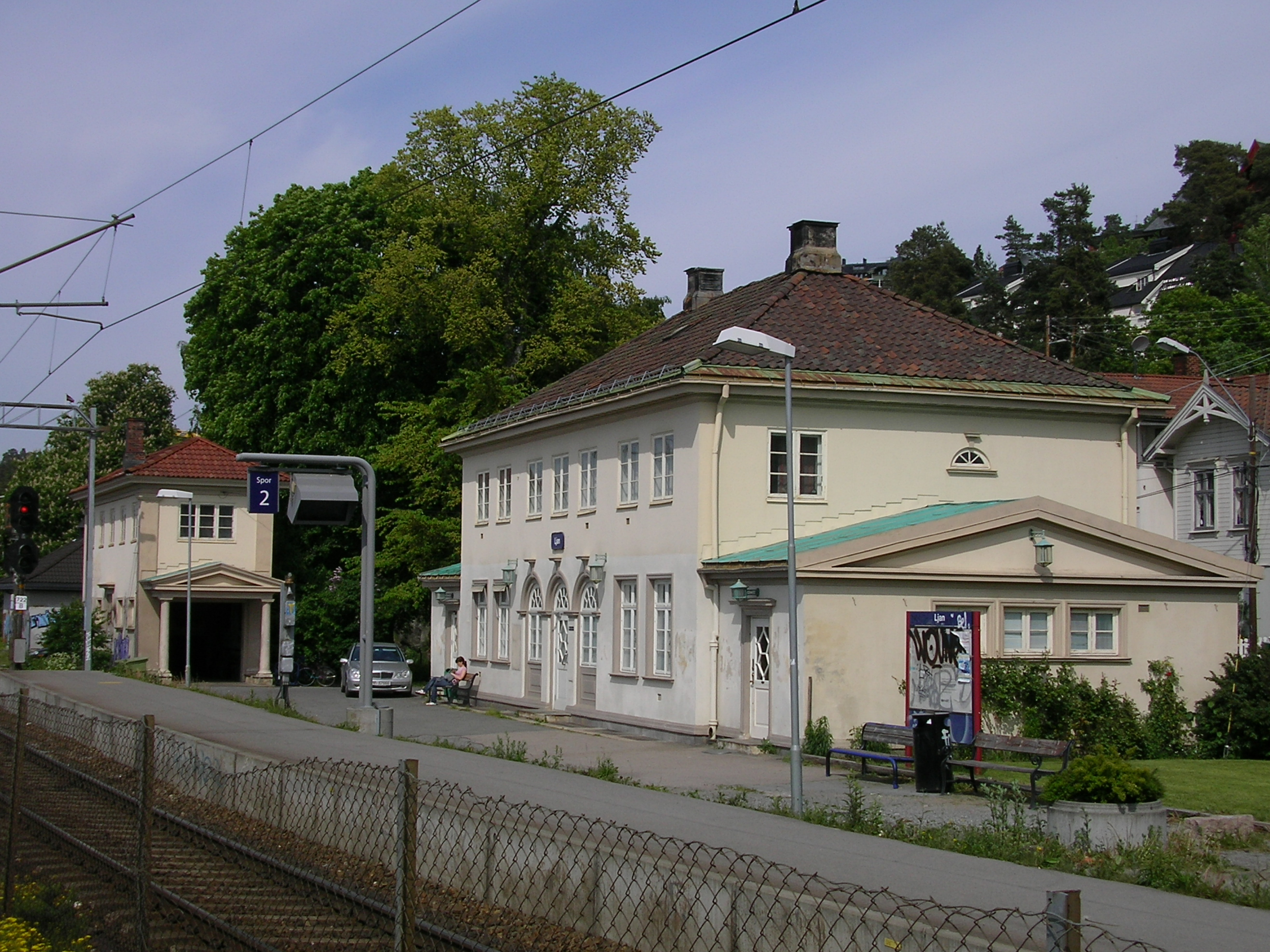 Ljan stasjon